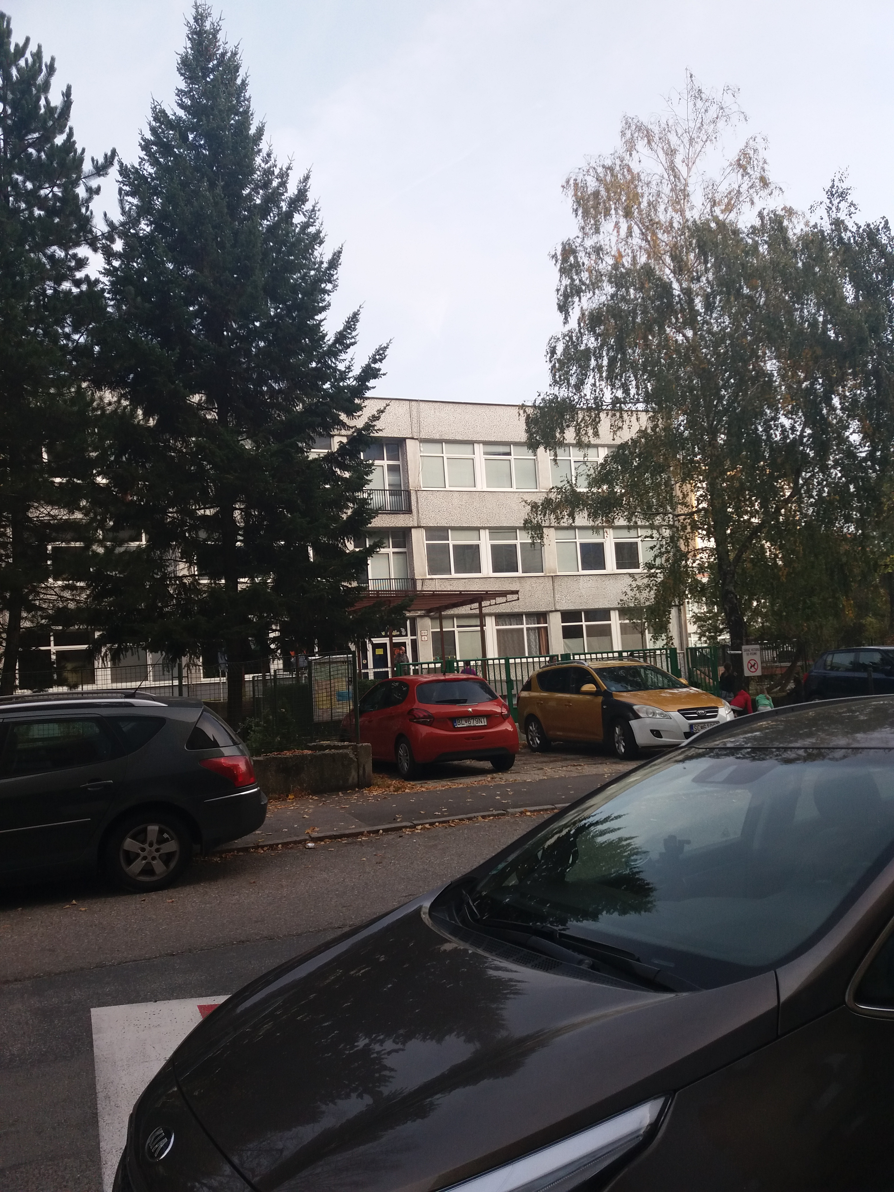 ZŠ Nejedlého